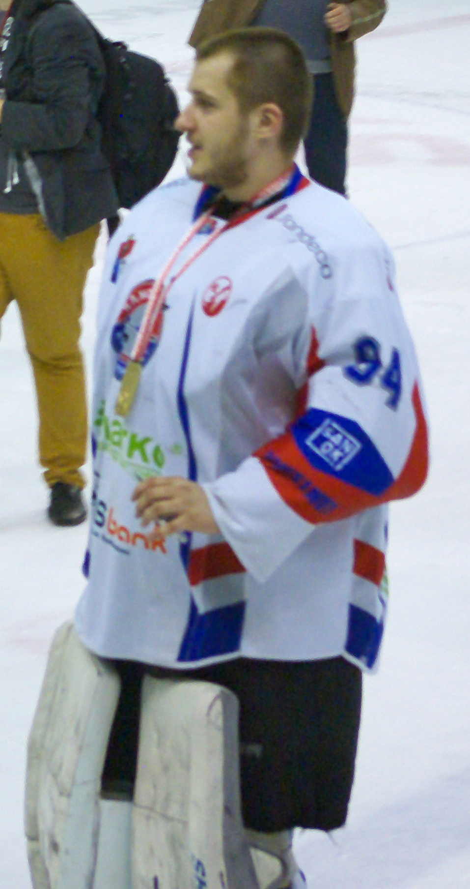 Szósty mecz finałowy o mistrzostwo Polski w hokeju na lodzie w sezonie PHL 2013/2014: Ciarko PBS Bank KH Sanok – GKS Tychy (2:0), 3 kwietnia 2014 w Sanoku (Arena Sanok). Ondřej Raszka